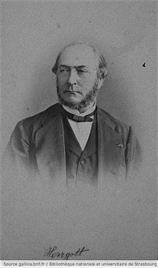 François Joseph Herrgott, Buste, Face , s.n (S.l) Date d'édition : 1850